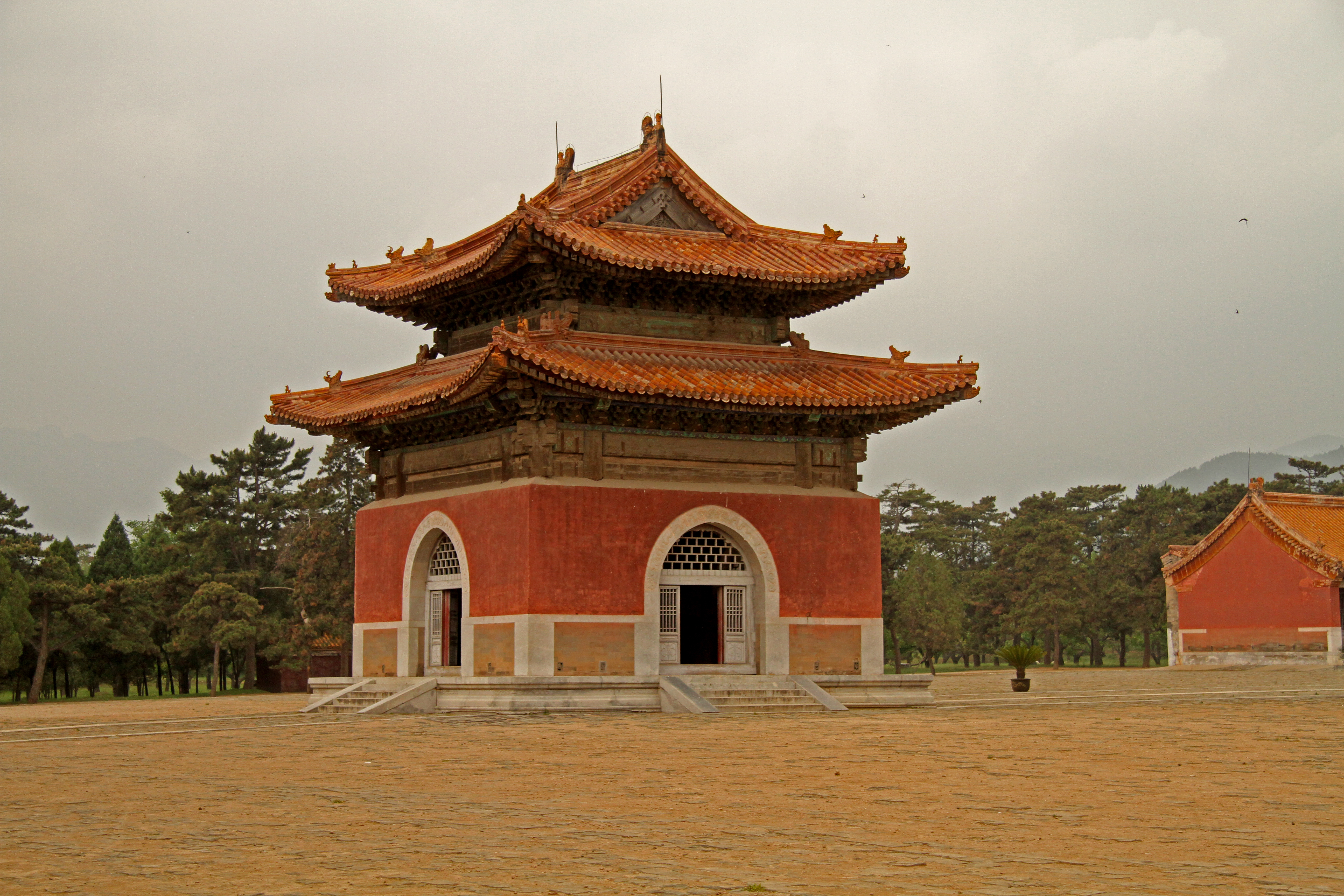 Qing Tombs 02